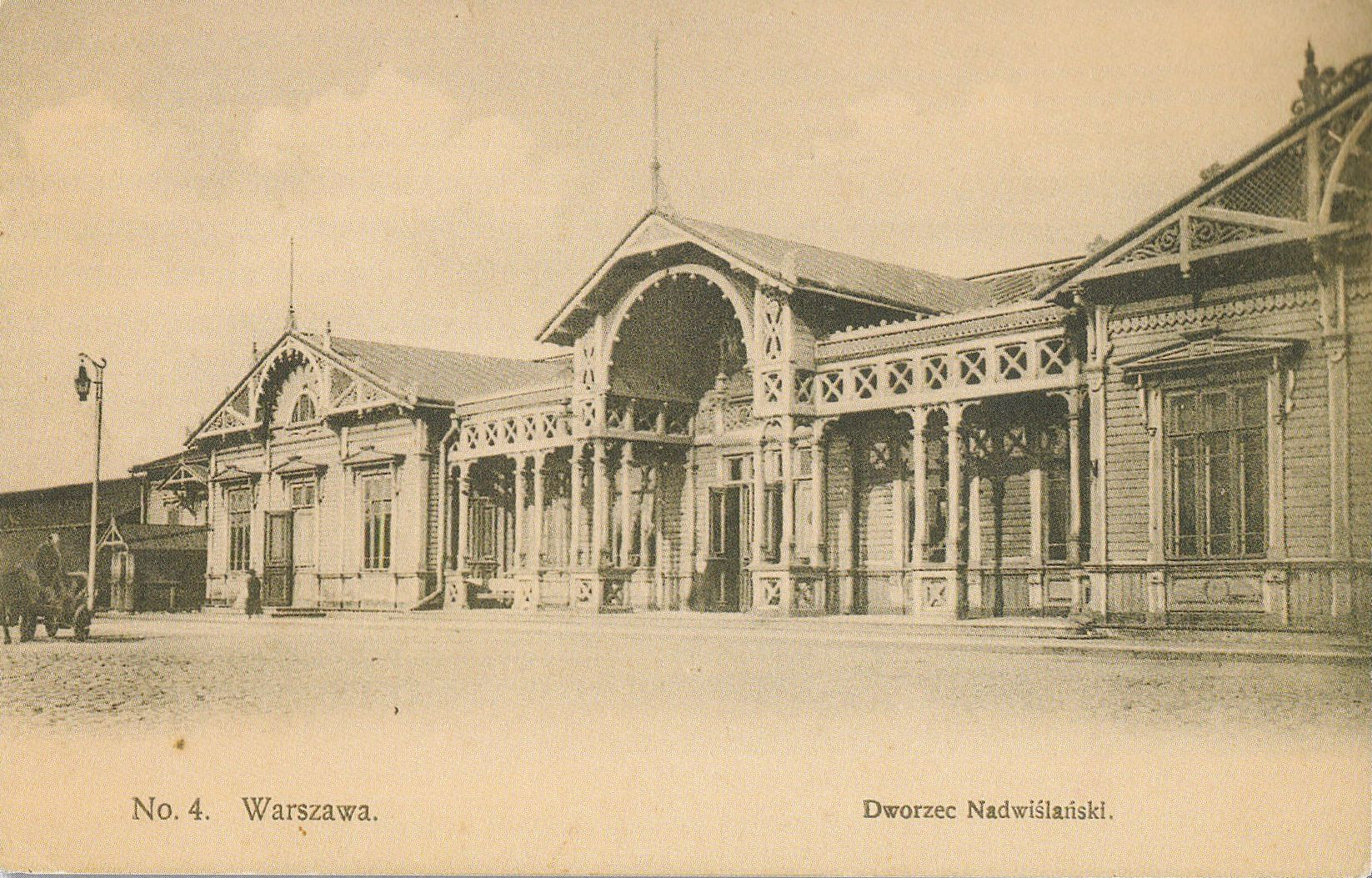 Dworzec Nadwiślański (Kowelski) w Warszawie